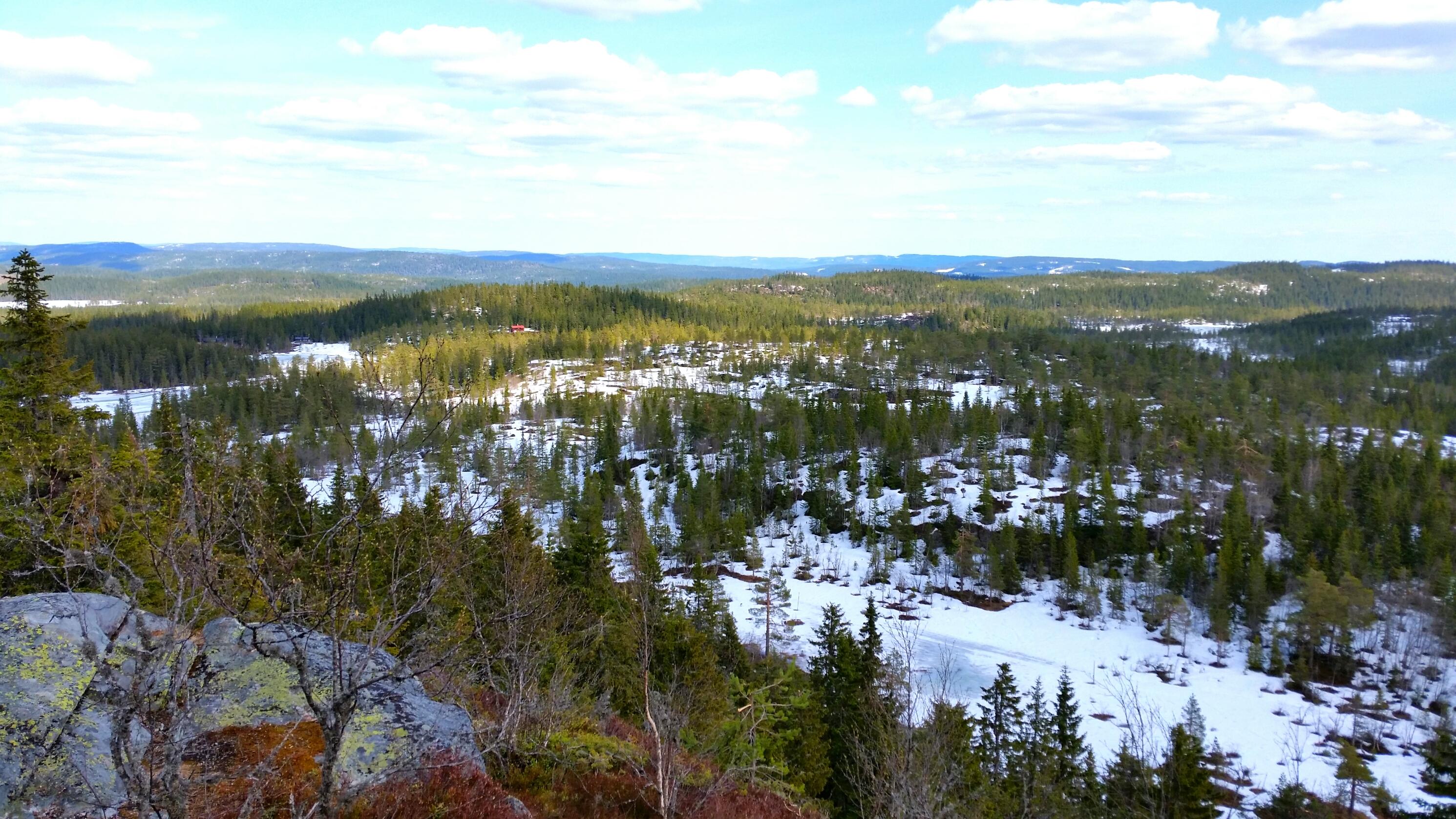 Utsikt østover fra Rughaugen en sen aprildag. Skiløypa mellom Borgersetra og Vambu sees på myra nedenfor toppen.